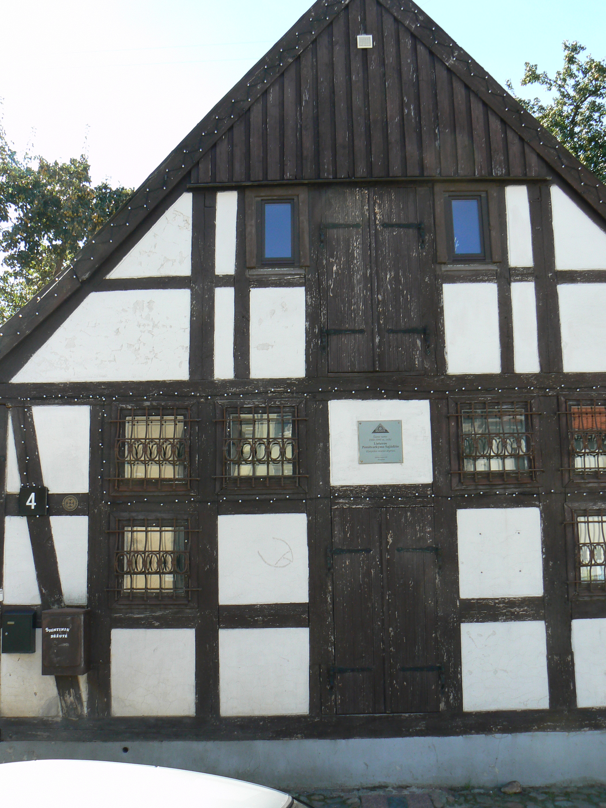 Loutkové divadlo v Klaipėdě, ul. Vežėjų gatvė 4, v letech 1988 - 1999 sídlo Sąjūdisu, Litevského hnutí za přestavbu